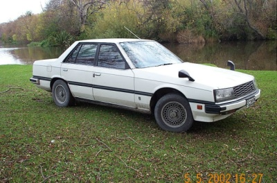 R30 GT-EX skyline sedan